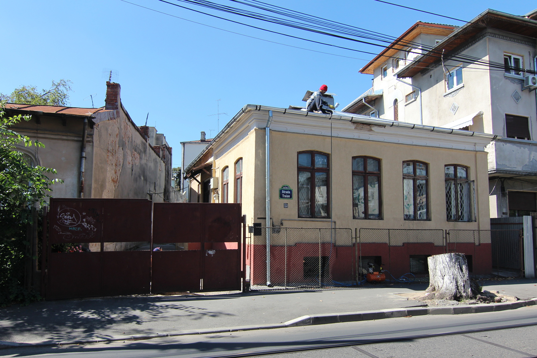 Casă pe strada Traian